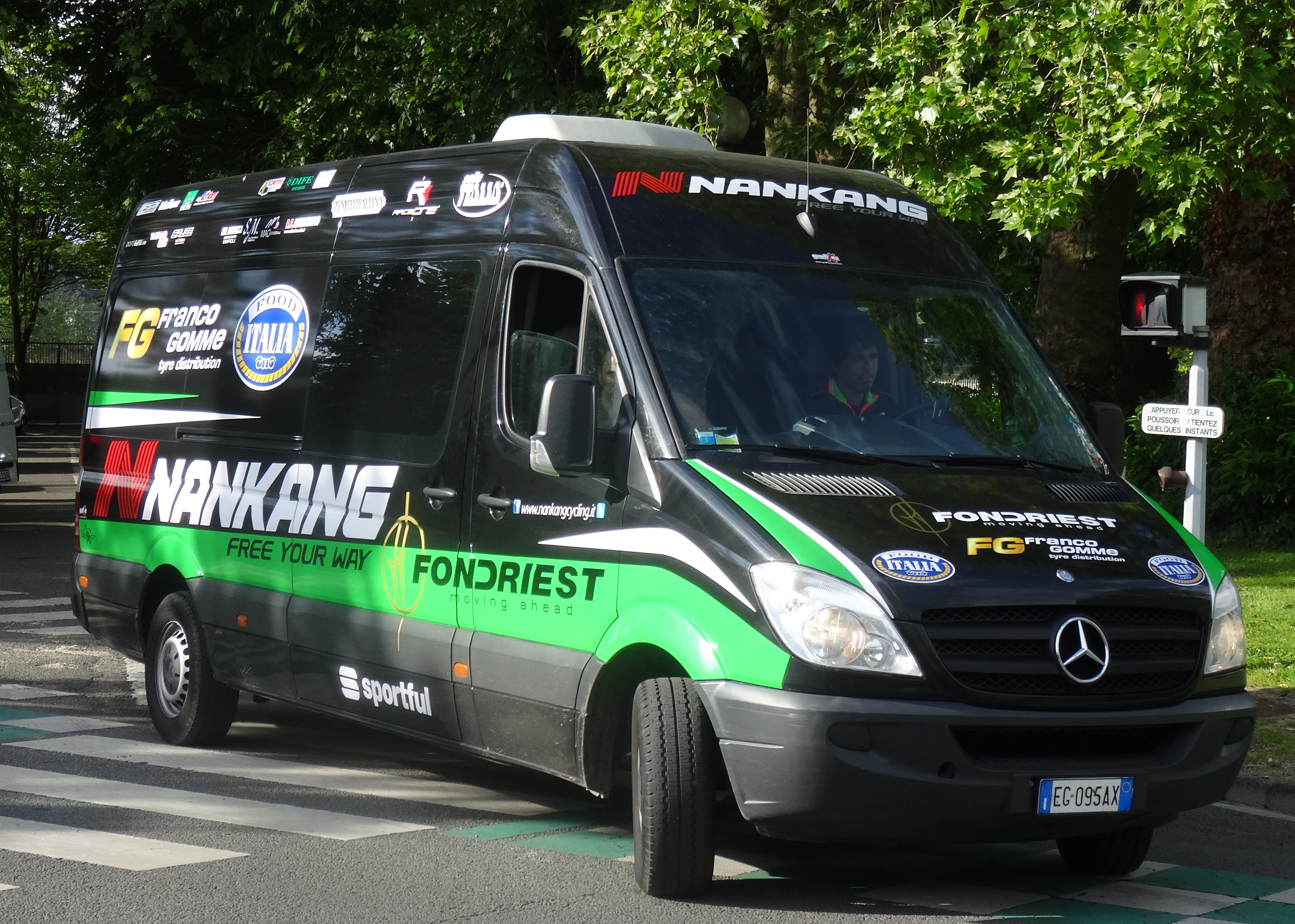 Reportage photographique réalisé le vendredi 23 mai 2014 à l'occasion de l'arrivée de la première étape du Paris-Arras Tour 2014 devant la citadelle d'Arras, Pas-de-Calais, Nord-Pas-de-Calais, France.